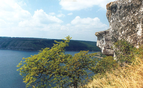 Подільські товтри 2.jpg: НПП "Подільські Товтри"